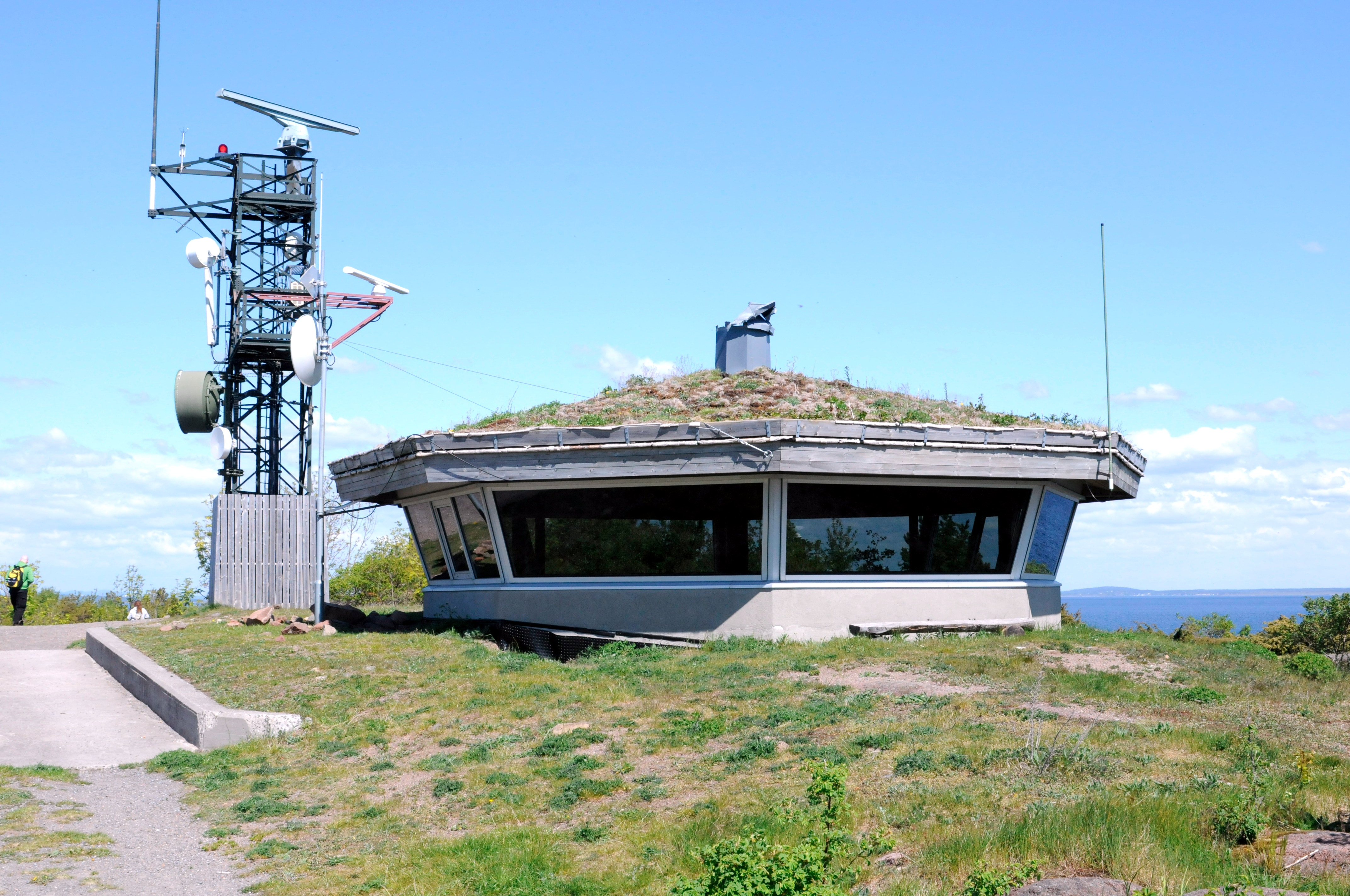 Bolærne fort - Observasjonspost